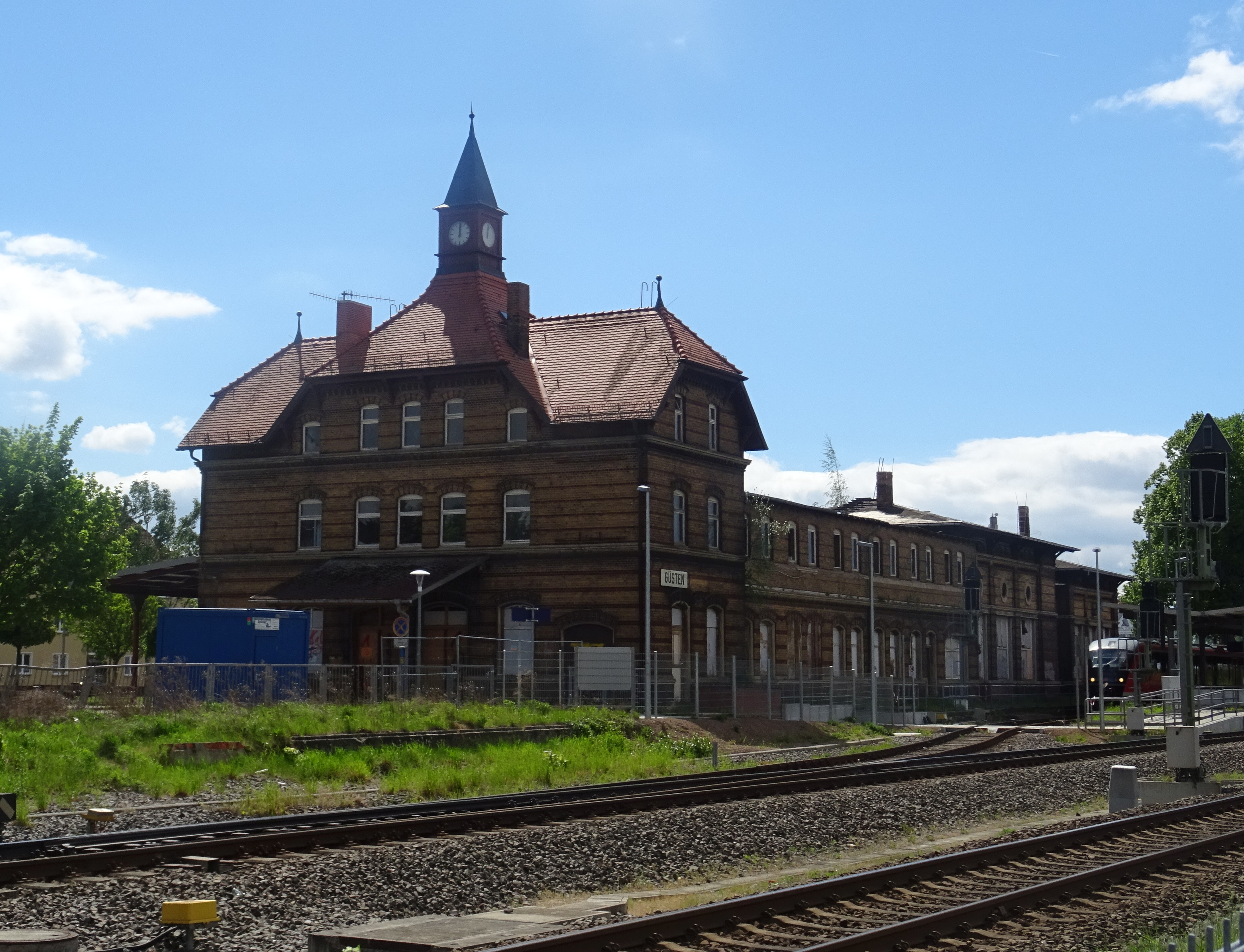 Bahnhof Güsten, Kulturdenkmal, Blick vom Nordwesten